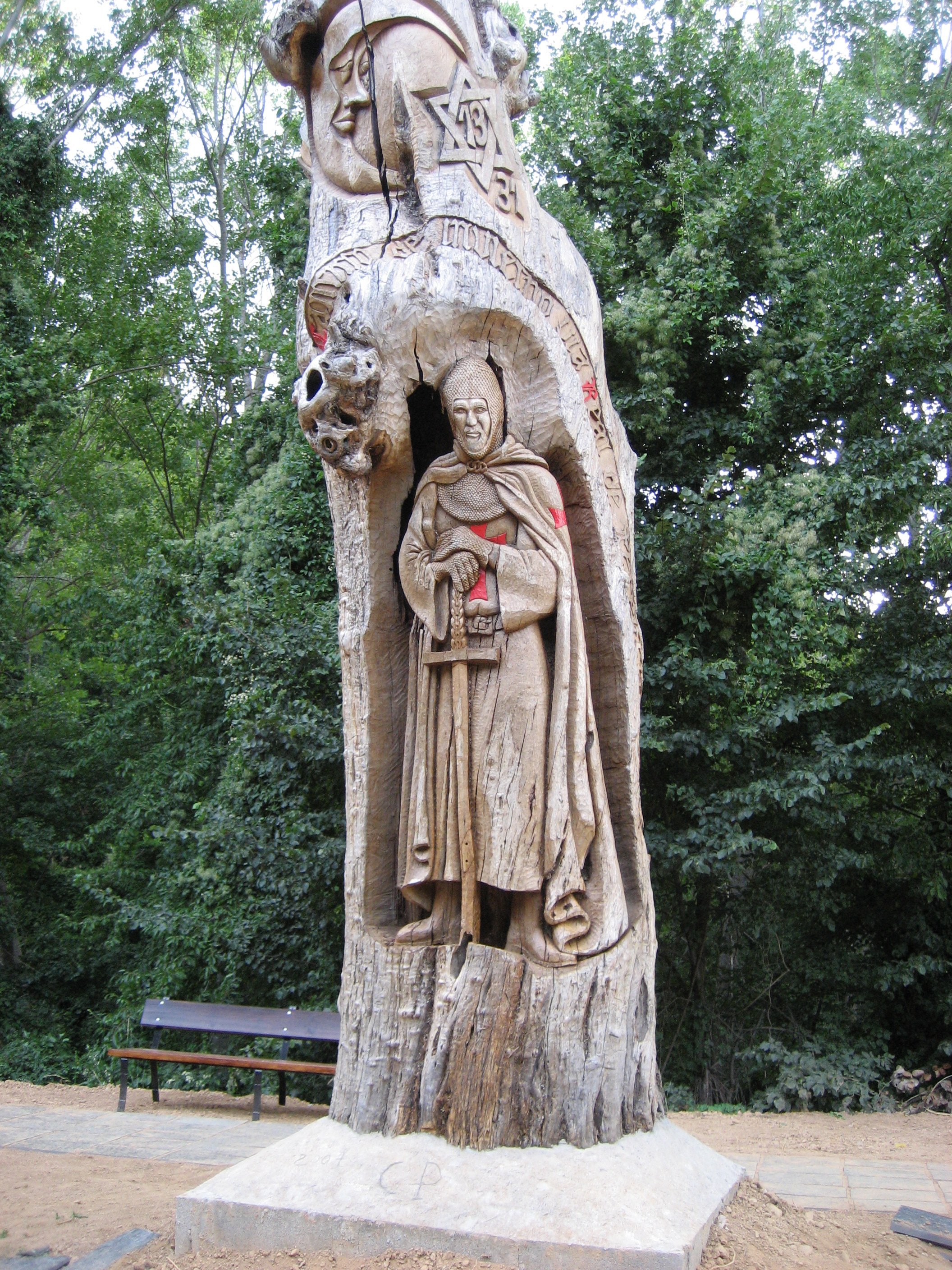 Talla de un caballero Templario en el tronco de un árbol en Santalla del Bierzo